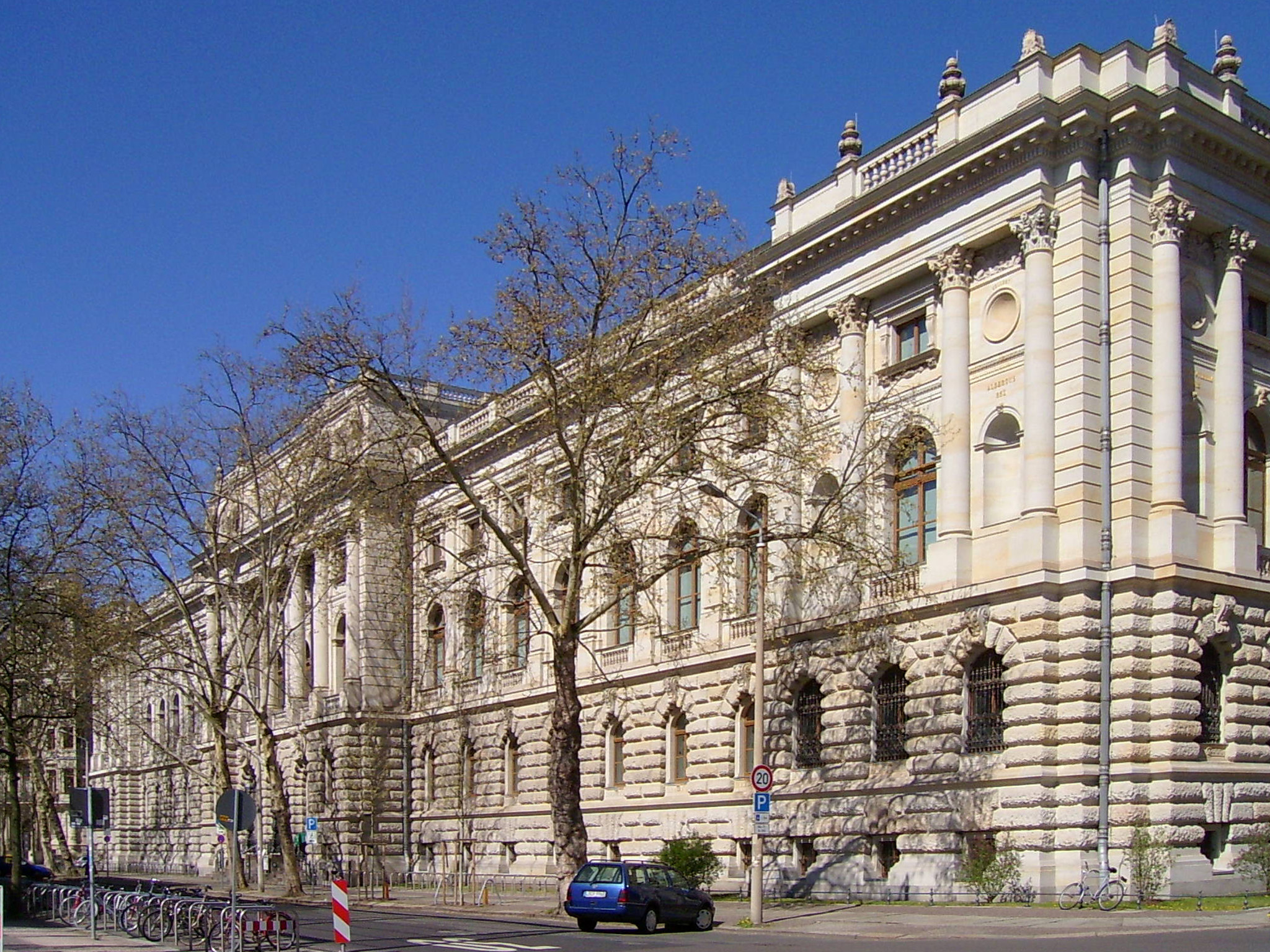 Hauptgebäude der Universitätsbibliothek Leipzig von 1891; im 2. Weltkrieg zerstört, 1994-2002 Wiederaufbau und Erweiterung